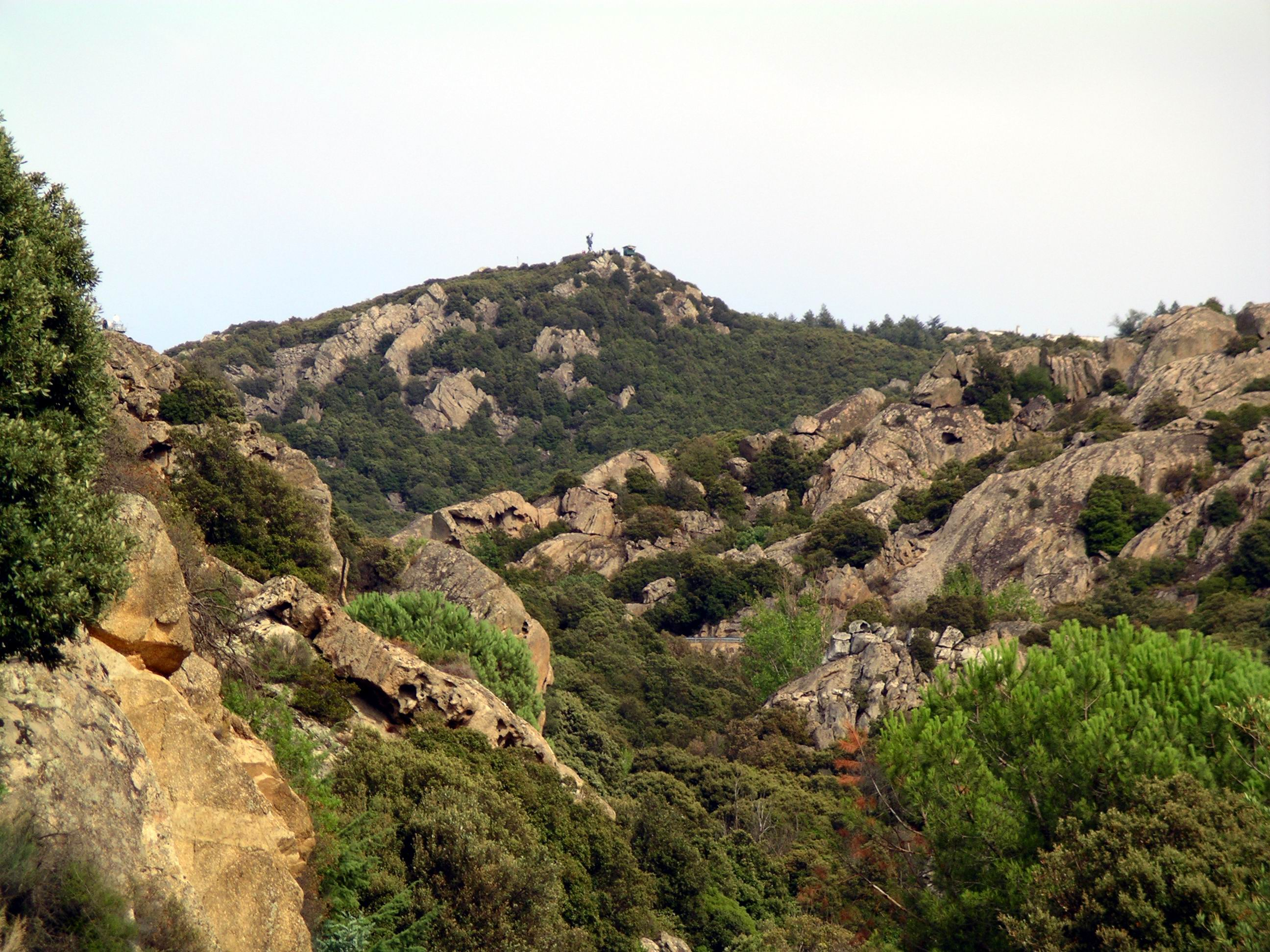 Vista dei Boschi del Monte Ortobene